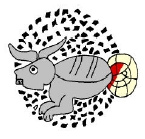 Glifo Náhuatl del municipio de Jaltocan,Hidalgo